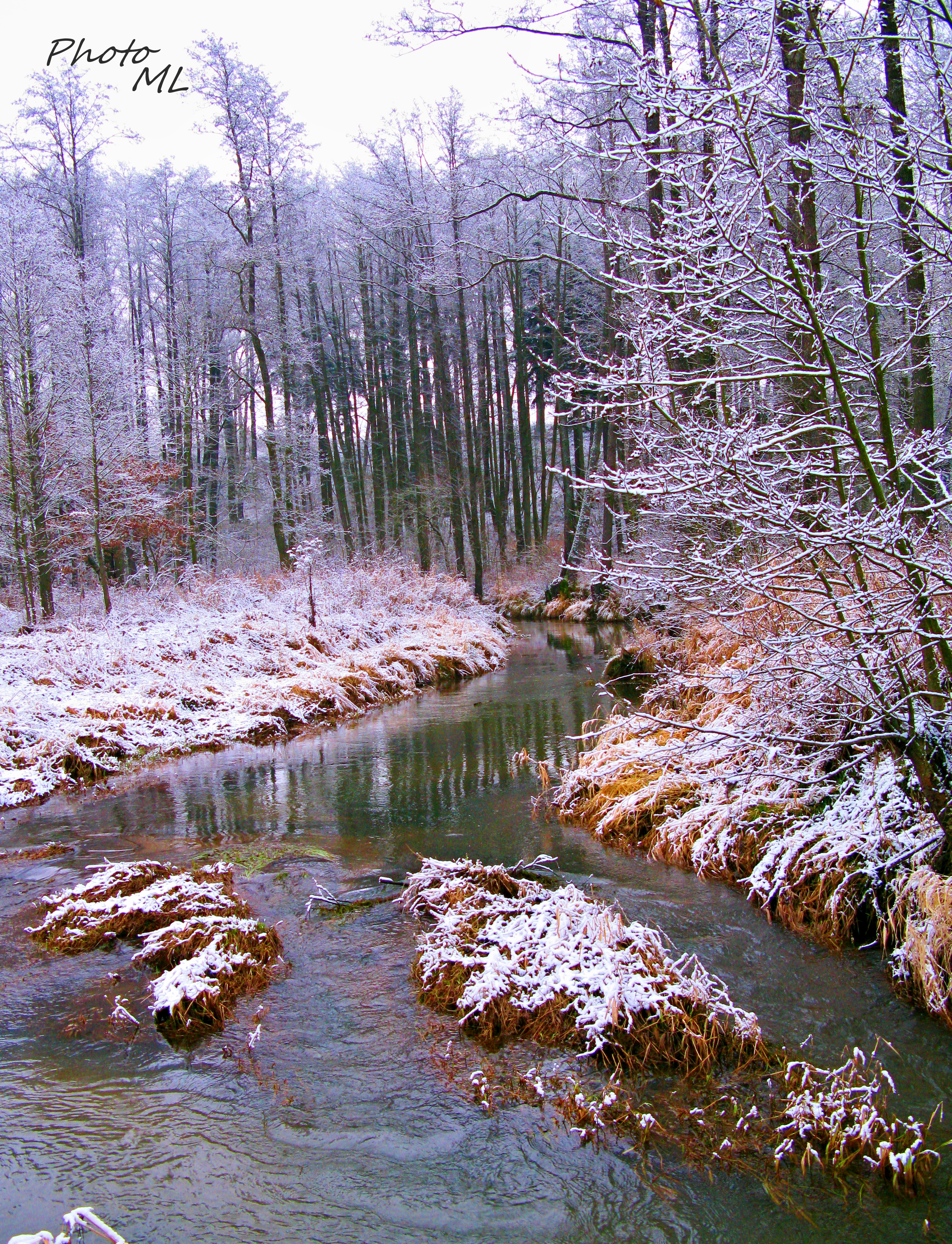 Řeka Plesná u Hartoušova